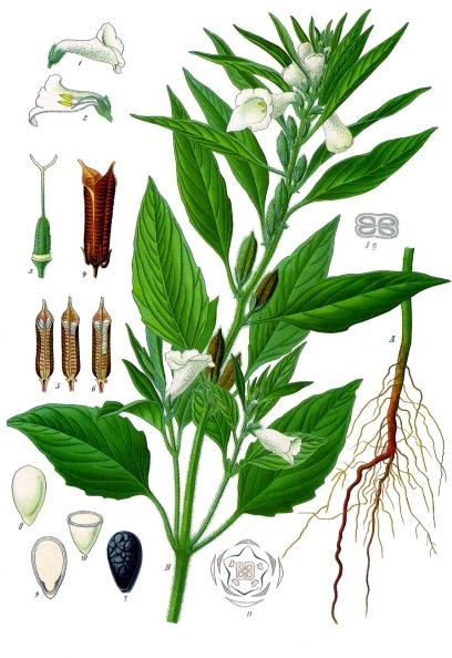 Sesam. A Wurzel. B Blühende und fruchttragende Pflanze. 1 Blüte, von der Seite gesehen; 2 Blüte im Längsschnitt; 3 Stempel; 3a Querschnitt des Stempels; 4 Reife Frucht im Aufspringen; 5, 6 Kapselhälften voneinander getrennt und geöffnet; 7 Samen der schwarzen Varietät; 8 Samen der weissen Varietät; 9 Samen im Längsschnitt; 10 Samen im Querschnitt; 11 Diagramm.